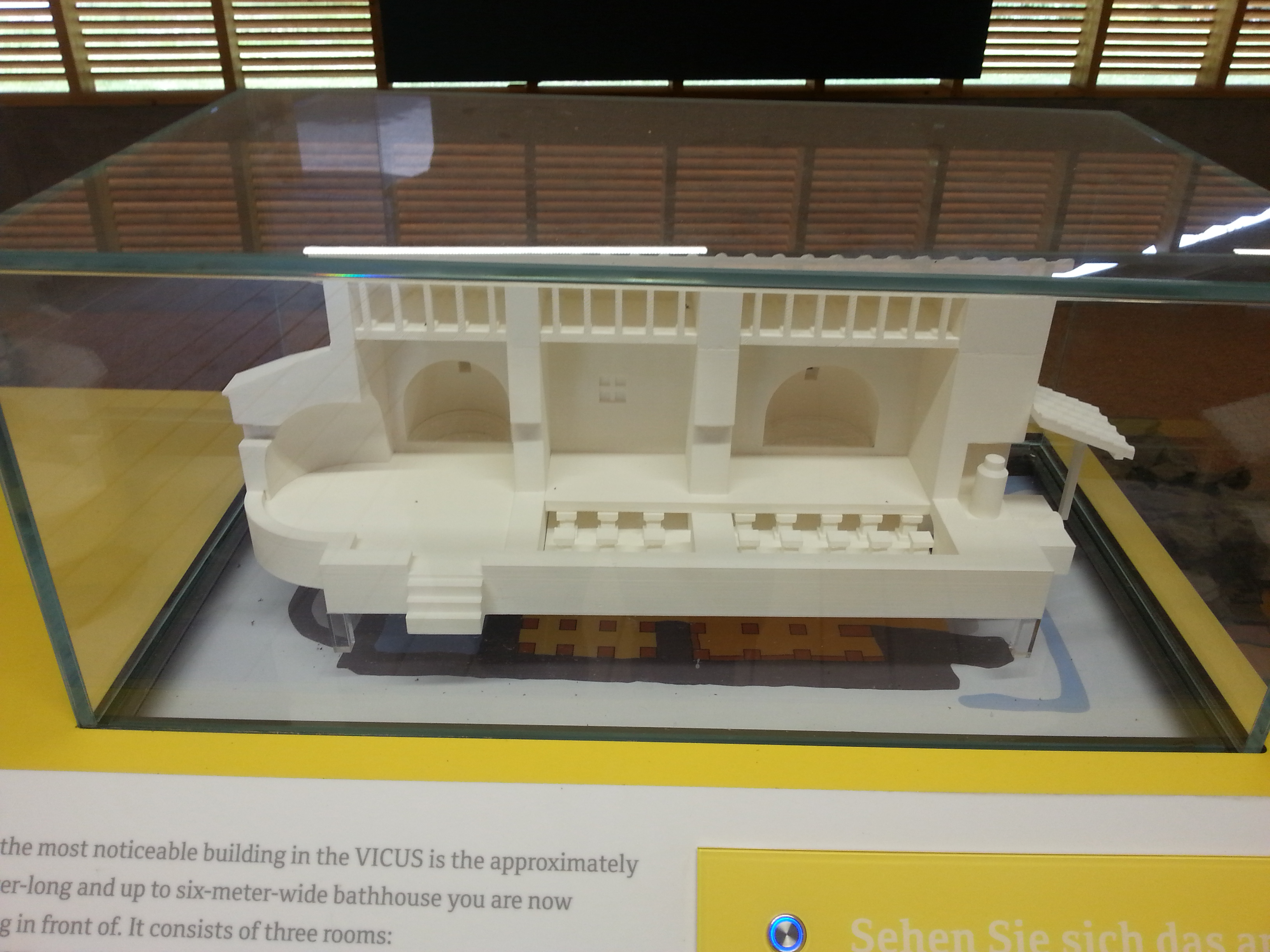 Aufrissmodell des römischen Badehauses von Schlögen (Ioviacum).